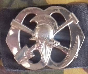 baret embleem en kraagspiegels pioniers